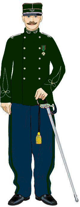 Sous-lieutenant (aspirant) des chasseurs forestiers, garde général stagiaire dans l'Administration des Eaux et Forêts période 1891 à 1909.